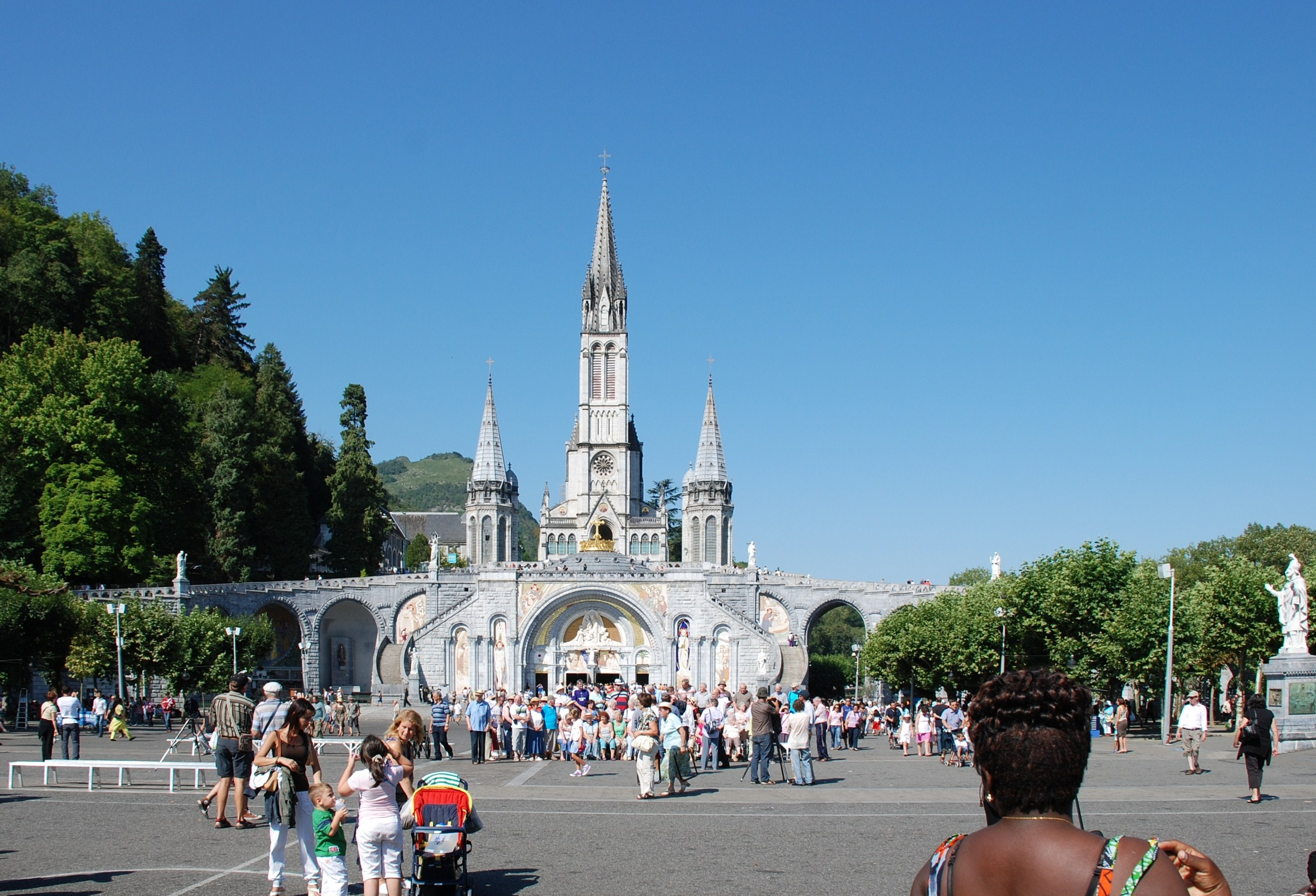 Esplanade du Rosaire à Lourdes